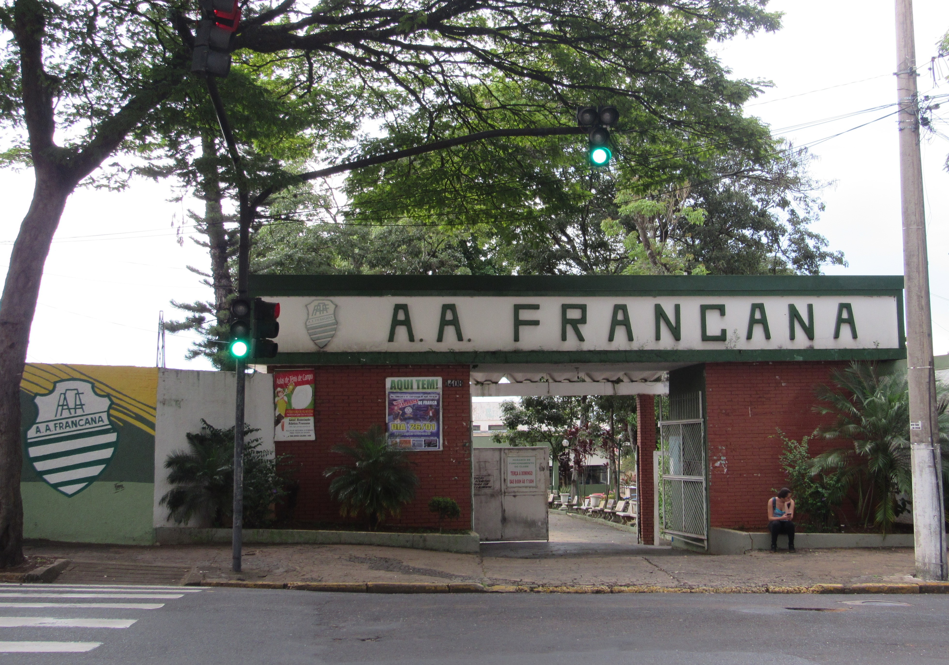 Associação Atlética Francana, Franca (SP), Brasil